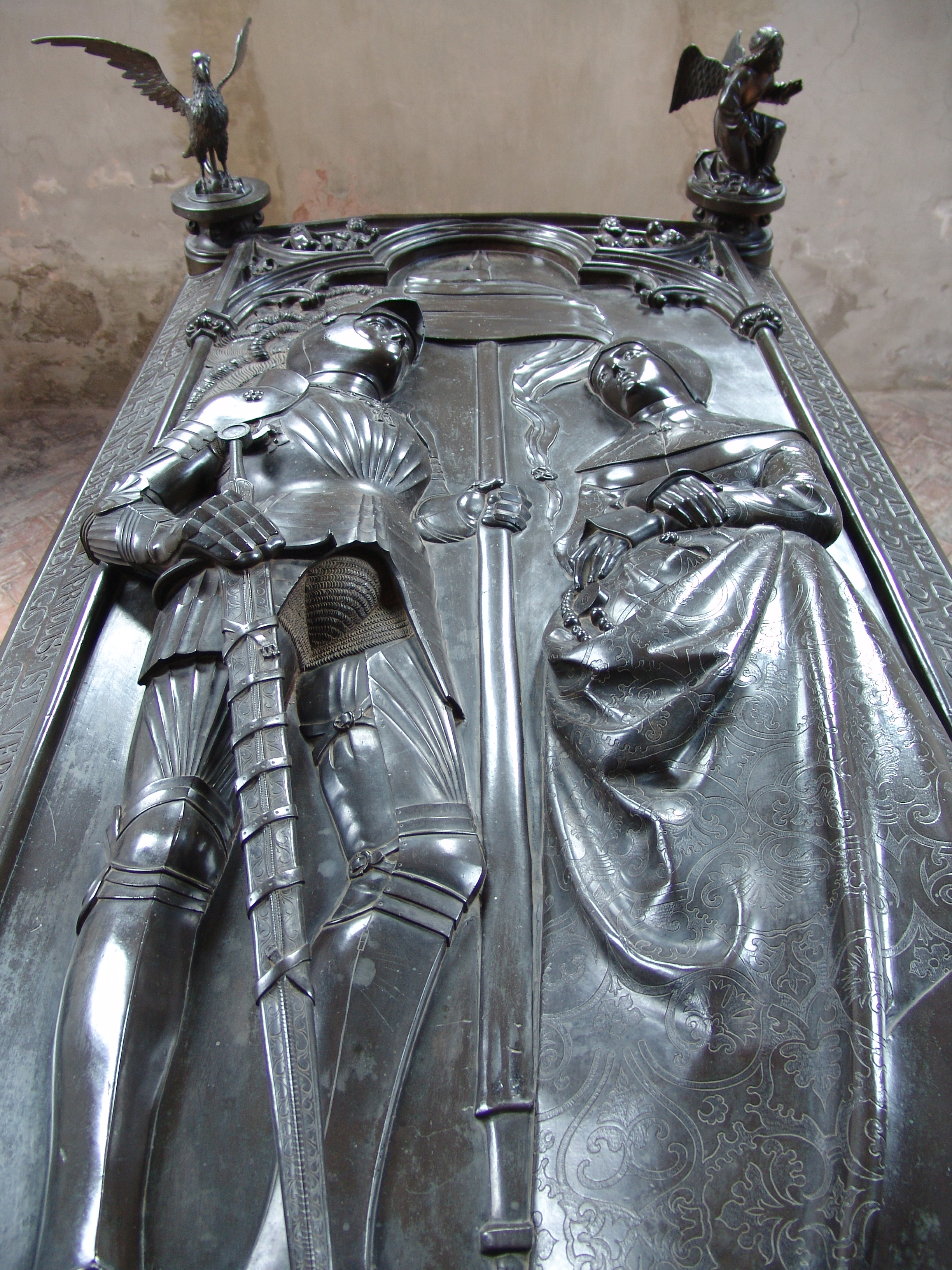 Römhild - Stiftskirche Grabmal Hermann VII. von Henneberg